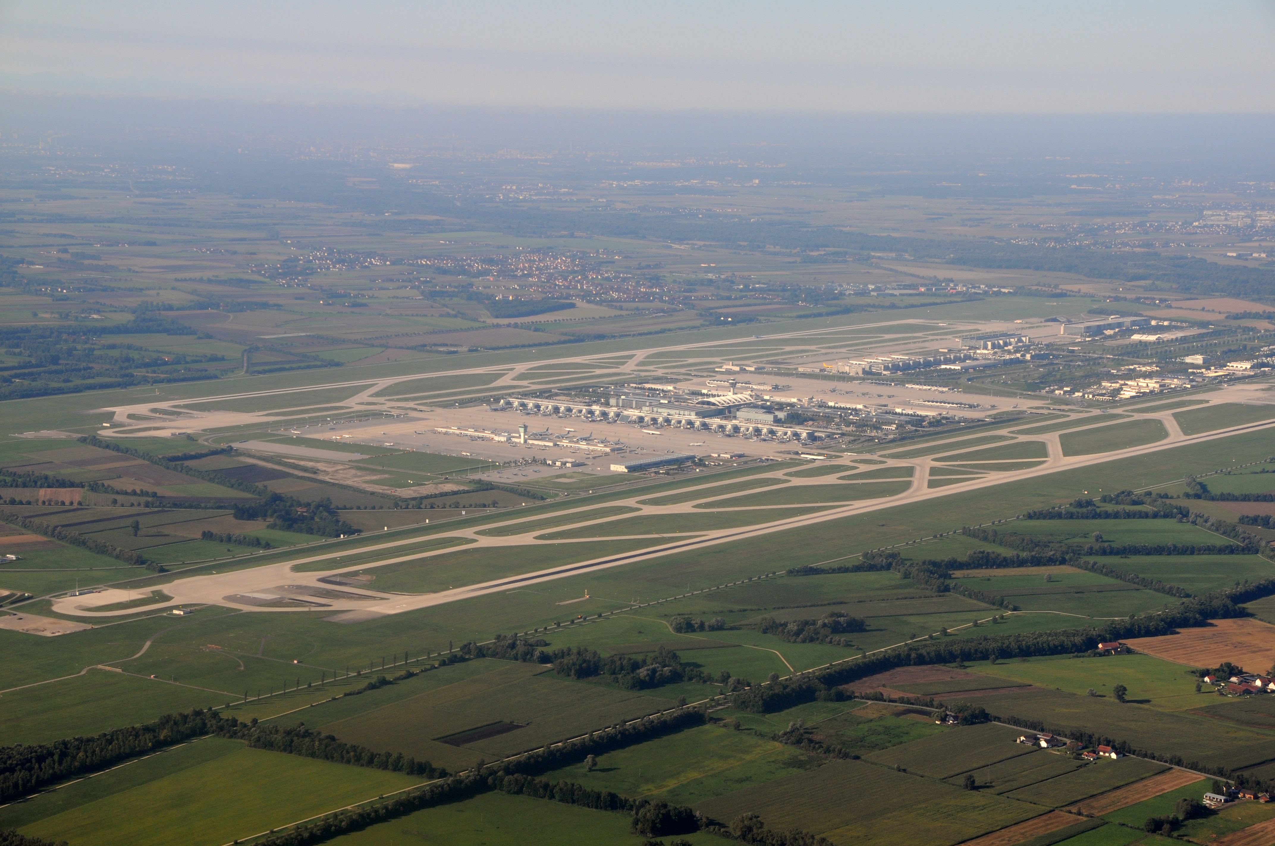 Flughafen München Franz Josef Strauß